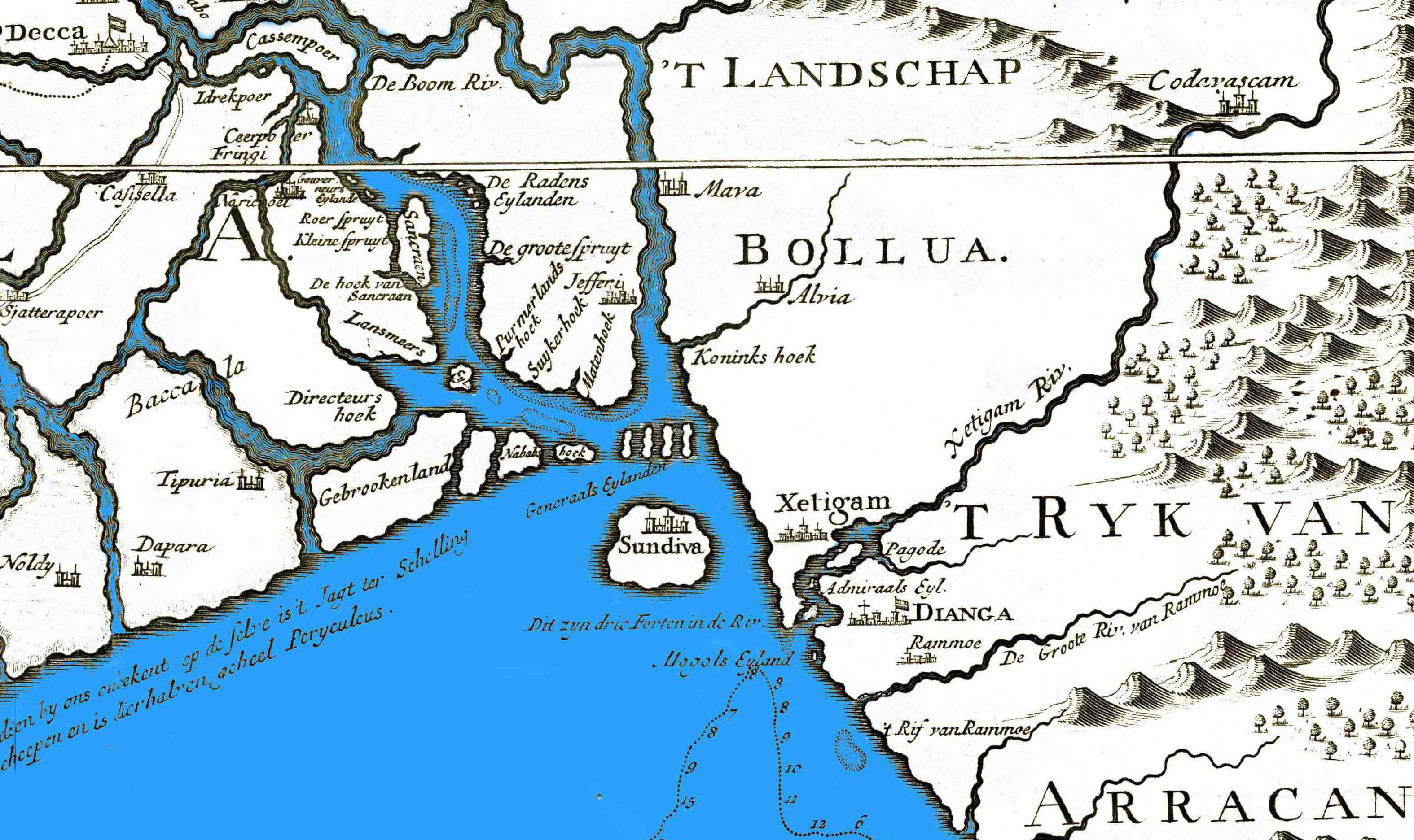 Extrato duma carta do Bengala, onde aparece a vila de Dianga, agora (1724) sob domínio holandez, Chittagong, Sundiva, e Dacca.